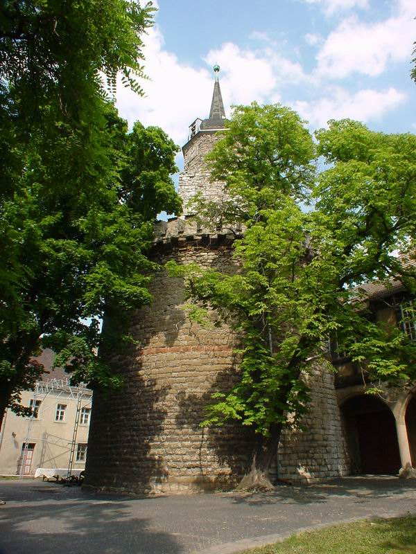 Seeburg, Bergfried eigenes Foto von 2004